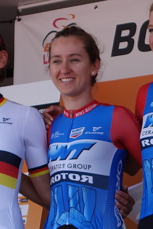 Lea Lin Teutenberg (WNT-Rotor) bij de start van de eerste etappe van Stramproy naar Weert in de Boels Ladies Tour 2019